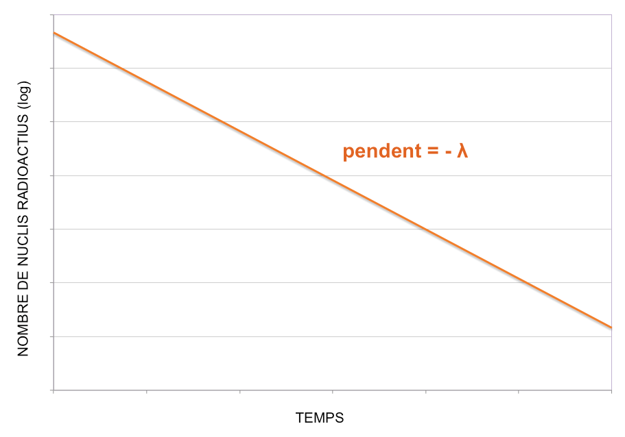 Linealització de la llei de la desintegració, on lambda (constant de desintegració) representa el pendent de la recta.